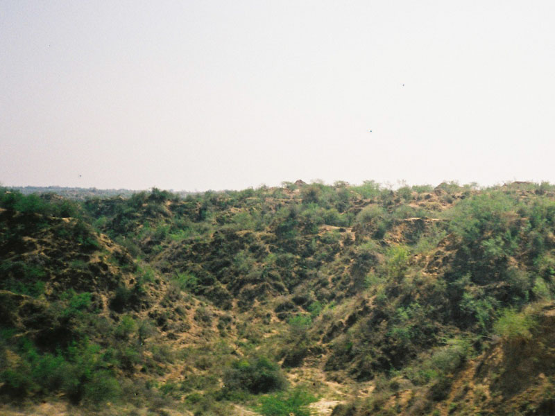 ചമ്പൽക്കാട്.